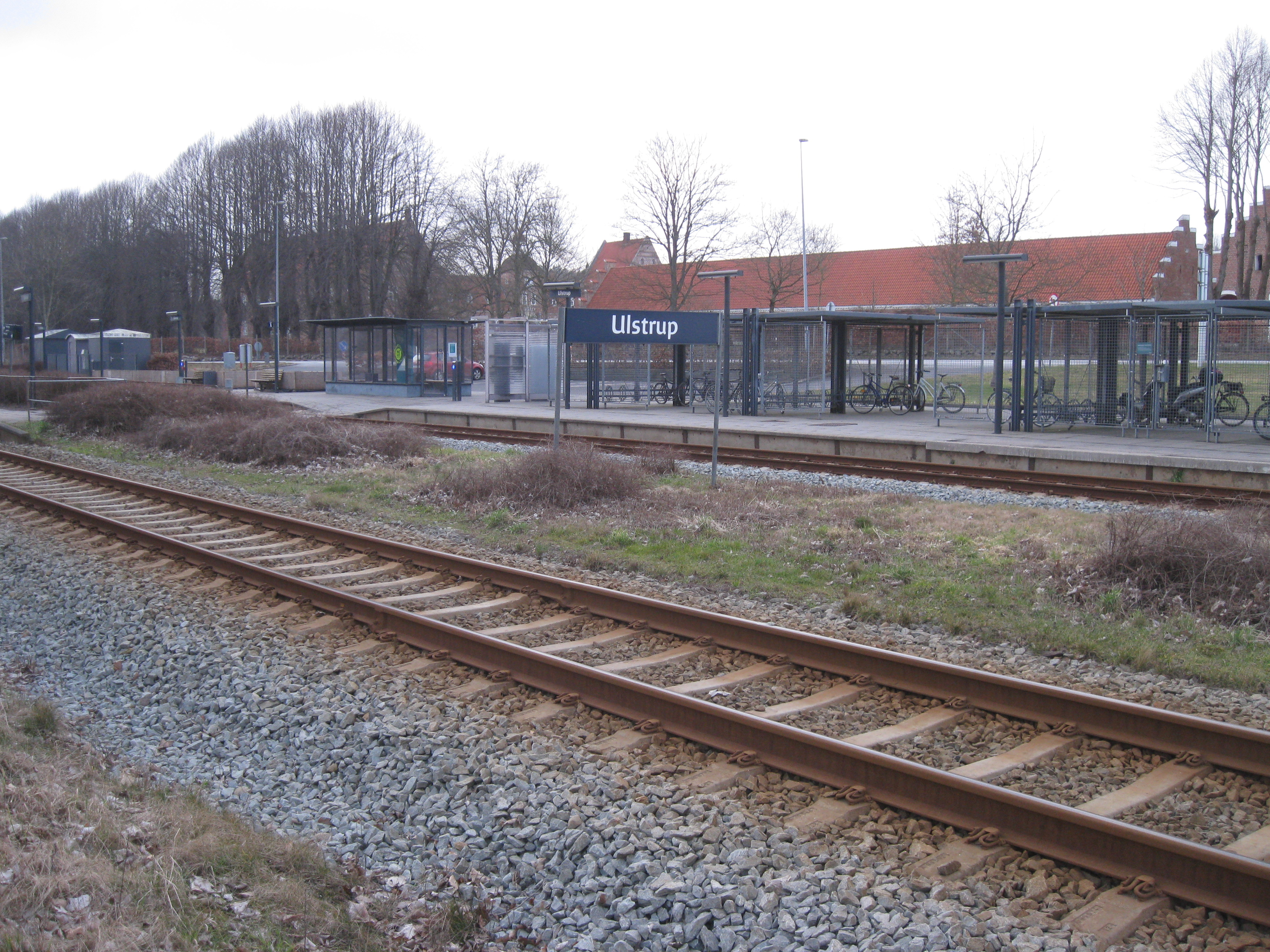 Ulstrup Station